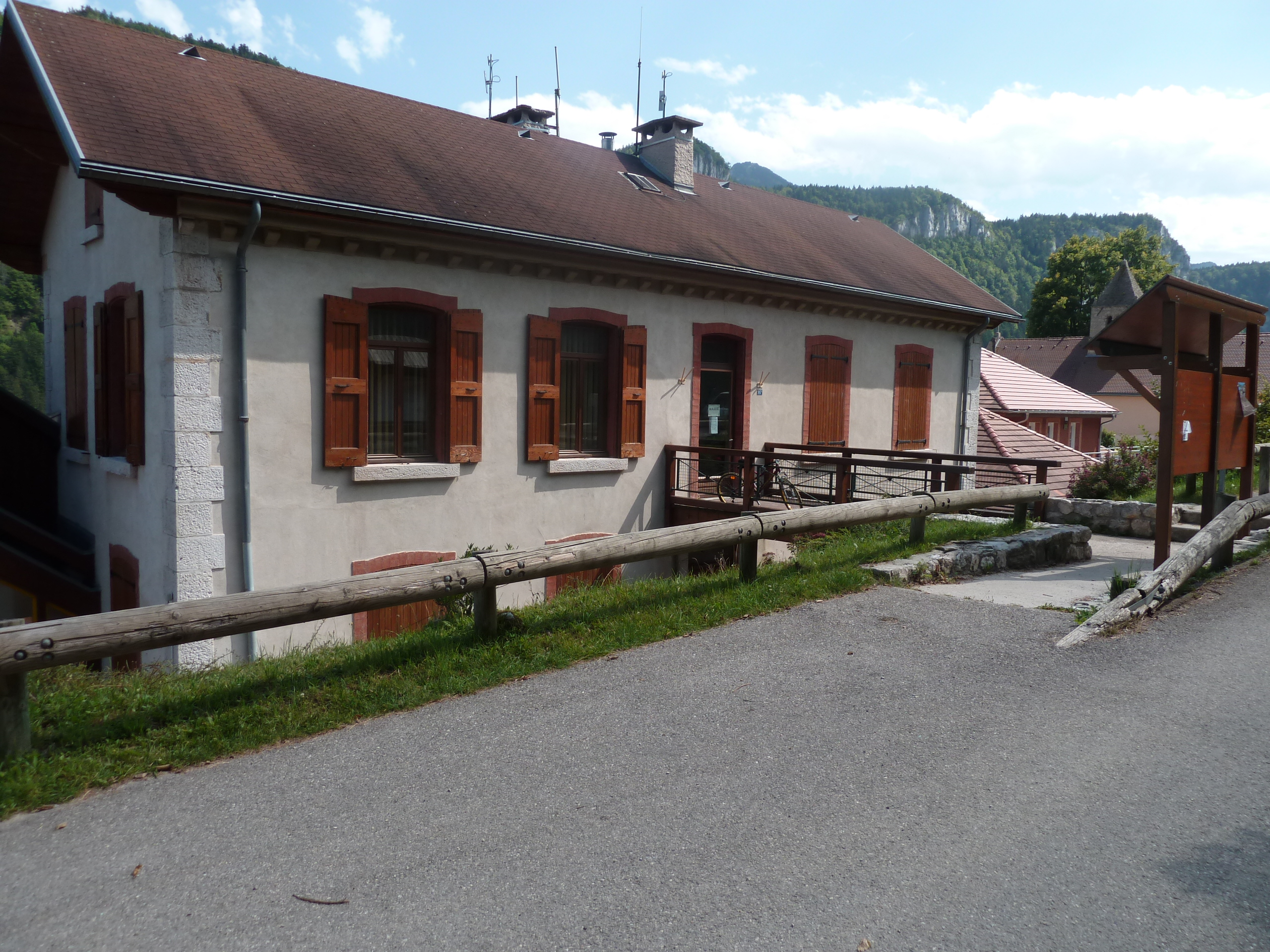 Engins (38) : La mairie.